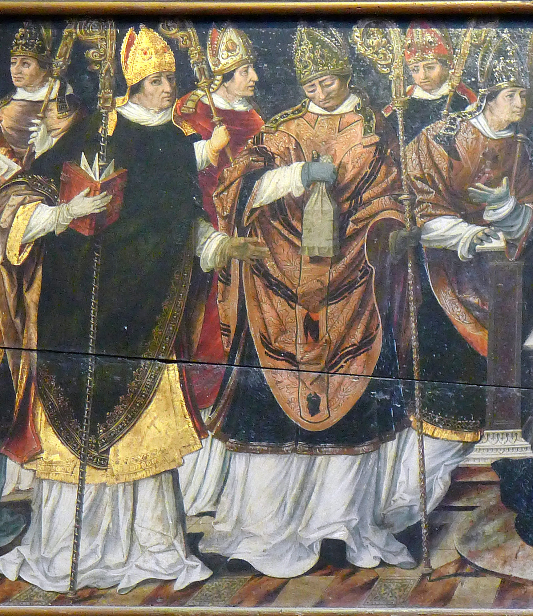 Détail du tableau "Un concile d'évêques présidé par la Vierge" de la basilique Saint-Trophime d'Arles.